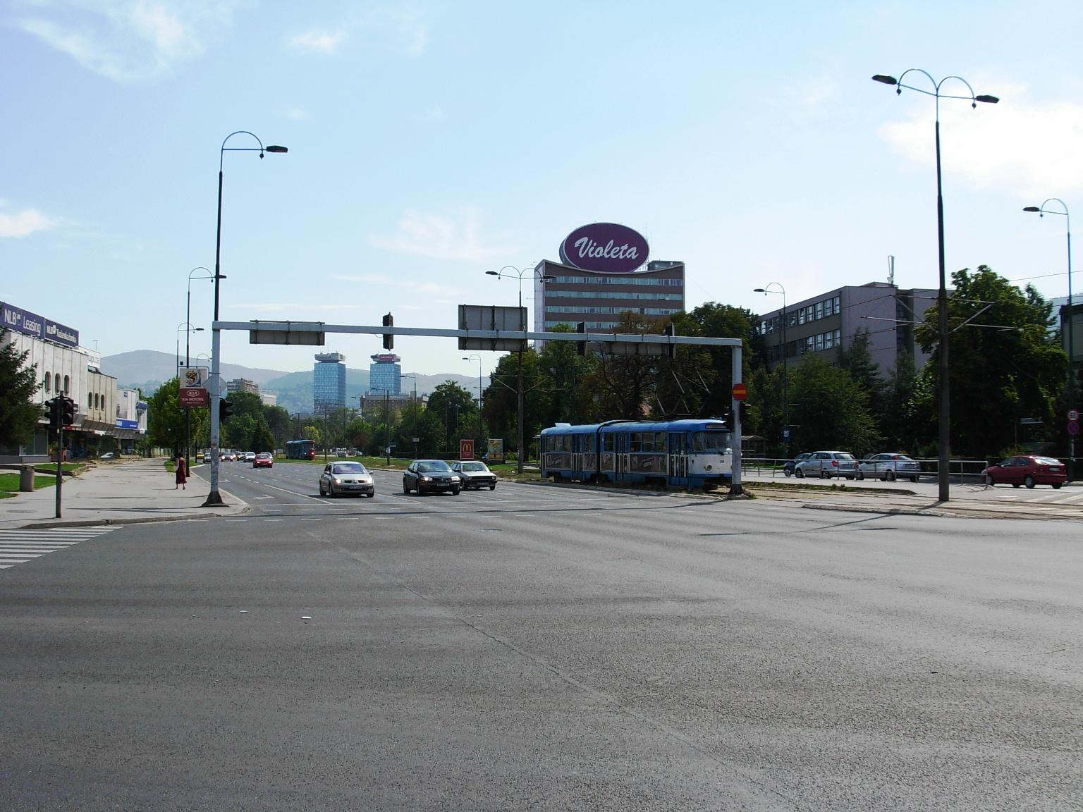 Ulica Zmaja od Bosne, Sarajevo, avgust 2011.